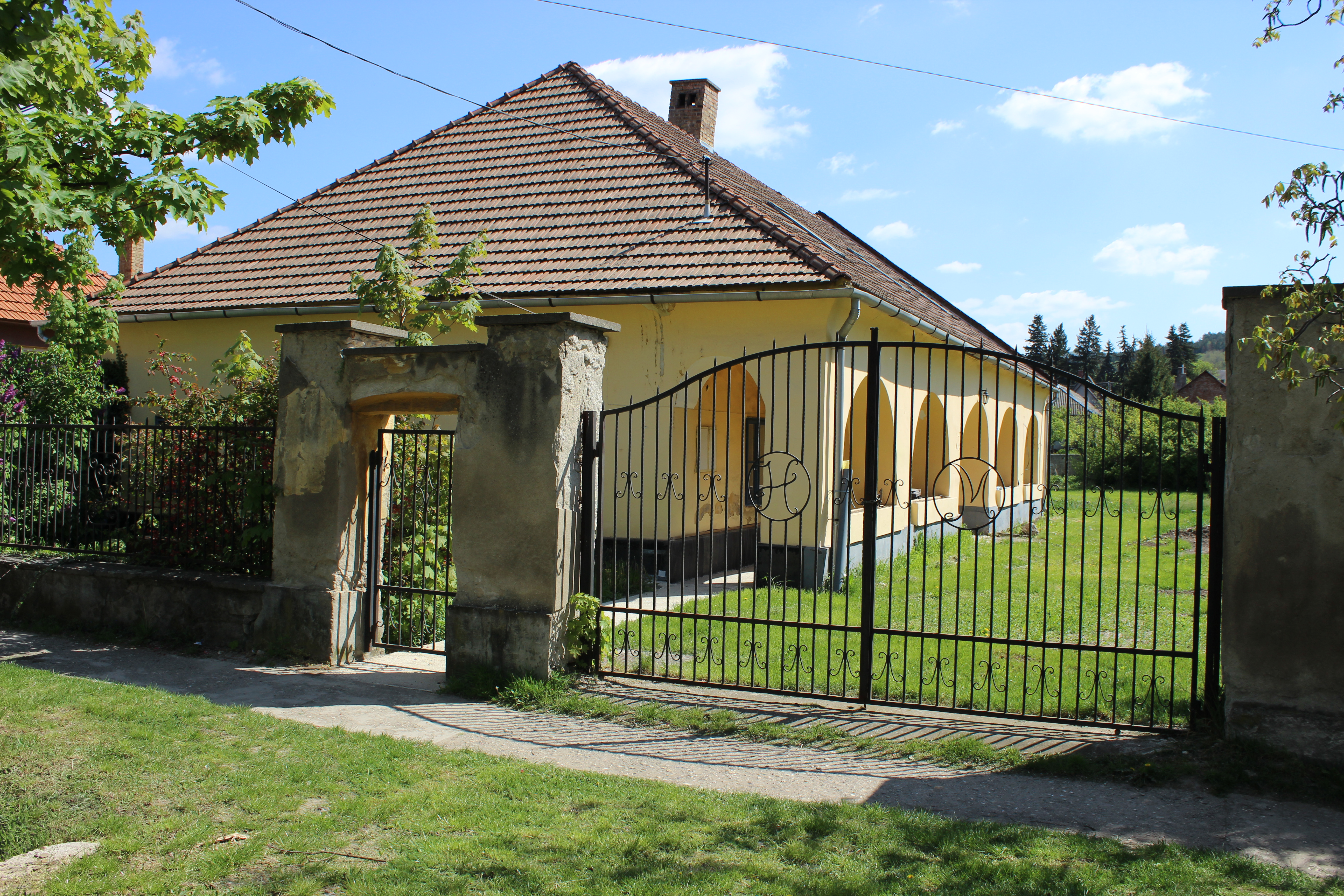 3881 Abaújszántó, Rákóczi u. 73.